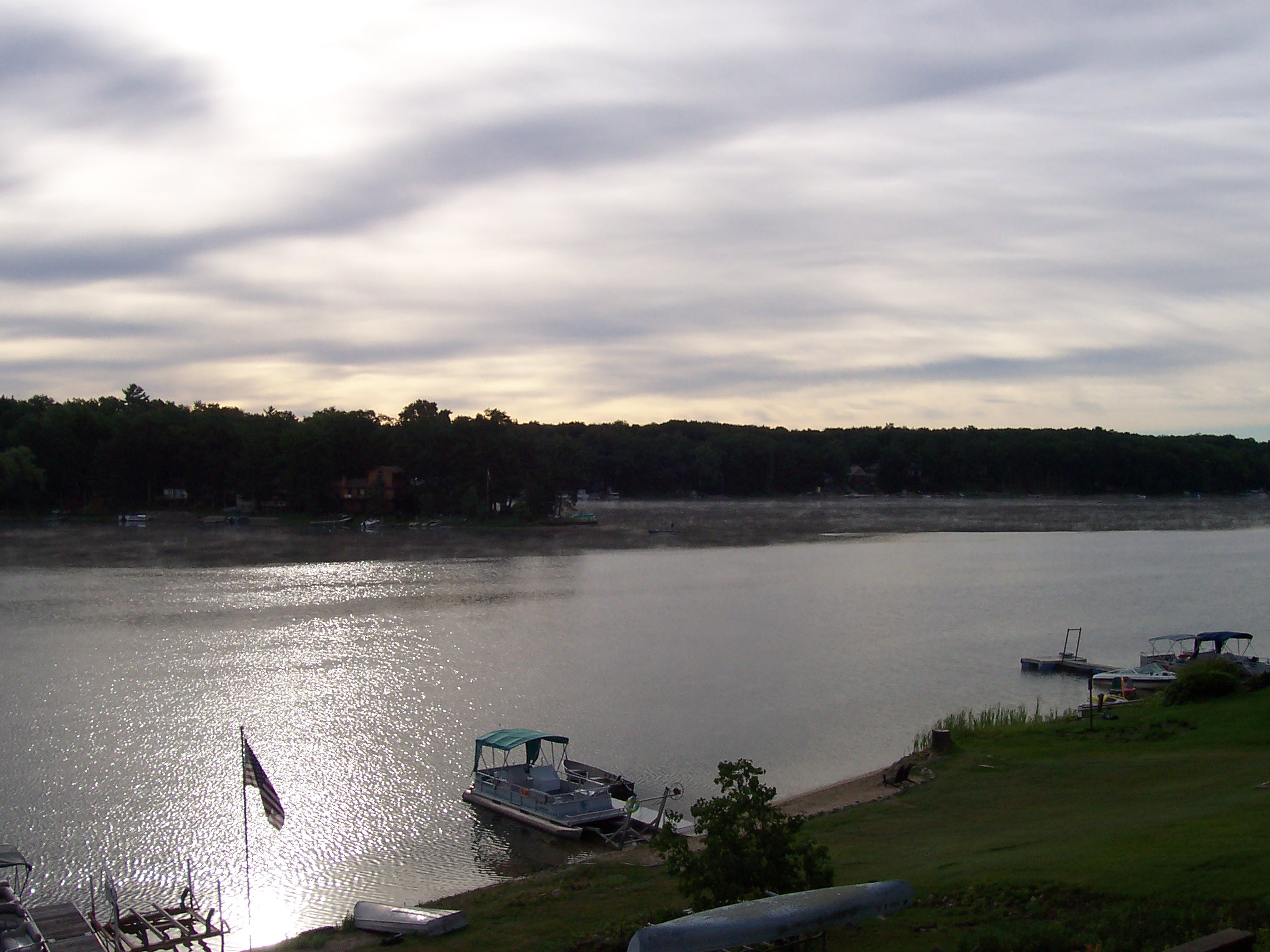 Budd Lake